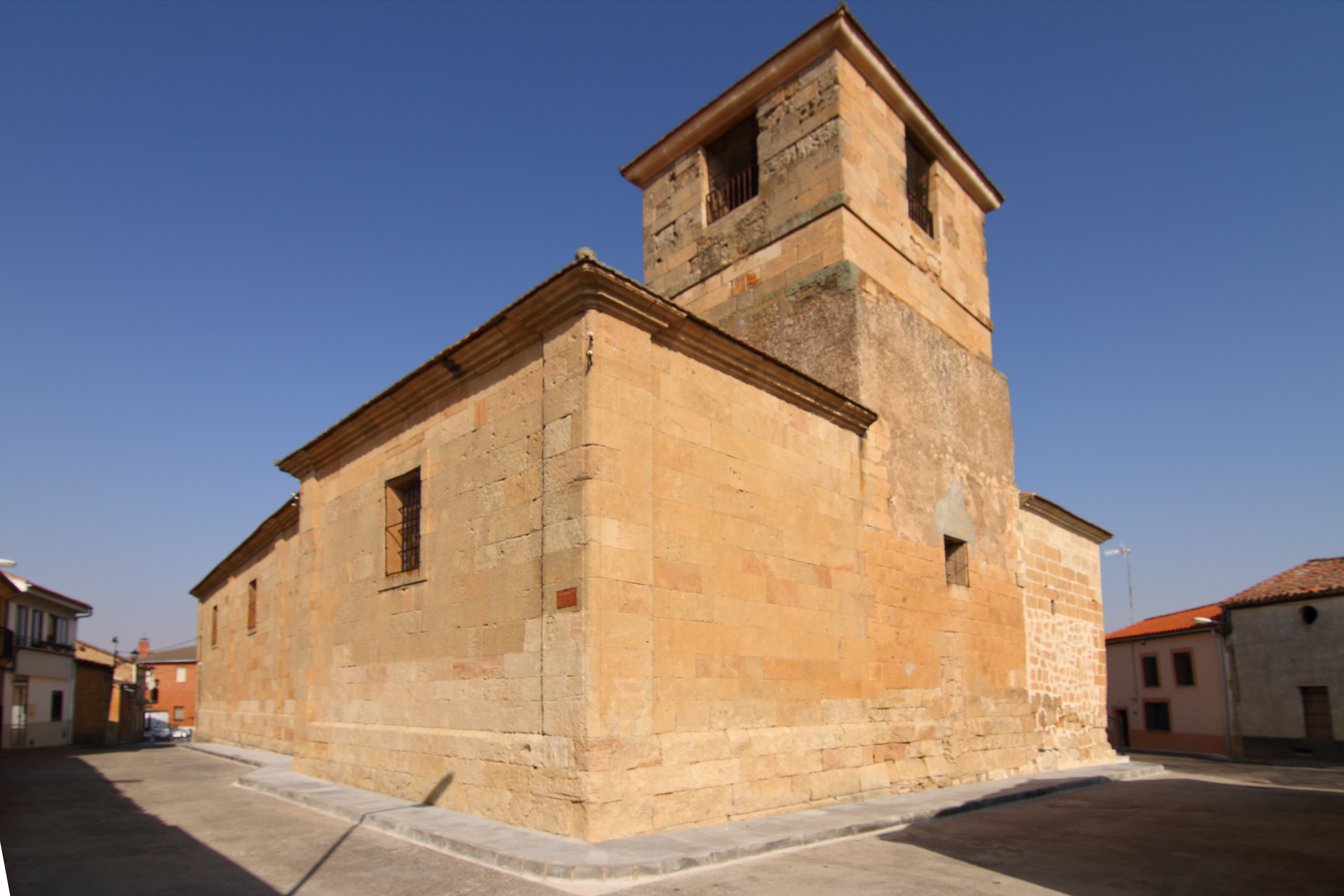 Torre Iglesia de Santiago Apóstol de Gomecello